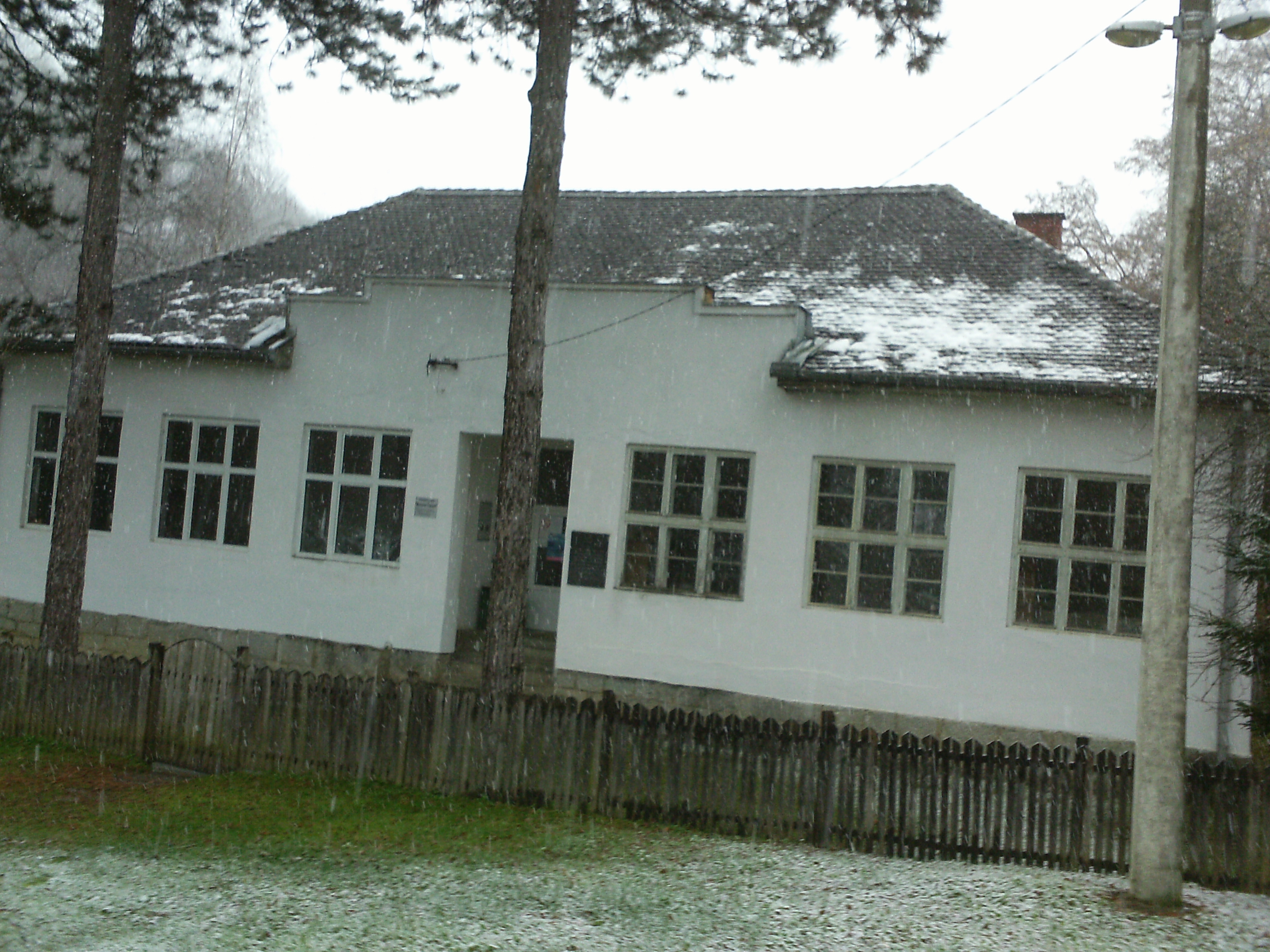 Најстарију по постанку школу у западном крају Србије.